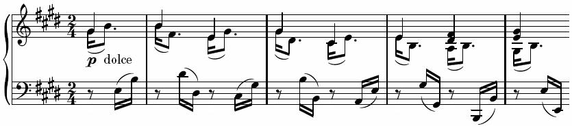 Description : premières mesures du premier mouvement de la sonate pour piano n° 30 de Beethoven Auteur : propre travail réalisé avec Lilypond Licence : Domaine public (auteur décédé depuis plus de 70 ans)